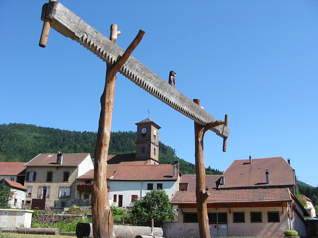 Allarmont Le passe-partout, emblème des bucherons Commune du canton de Raon-l'Étape (Vosges) Photo personnelle du 17 juillet 2006. Copyright © Christian Amet